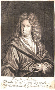 Bildnis des Franz Anton von Sporck (1662 - 1738), Reichsgraf und Kunstmäzen